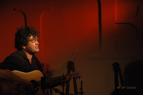 Daniël Lohues in Toomler te Amsterdam op zondag 21 mei 2006.